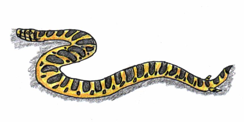 Reconstrucción manual de un Pachyrhachis.